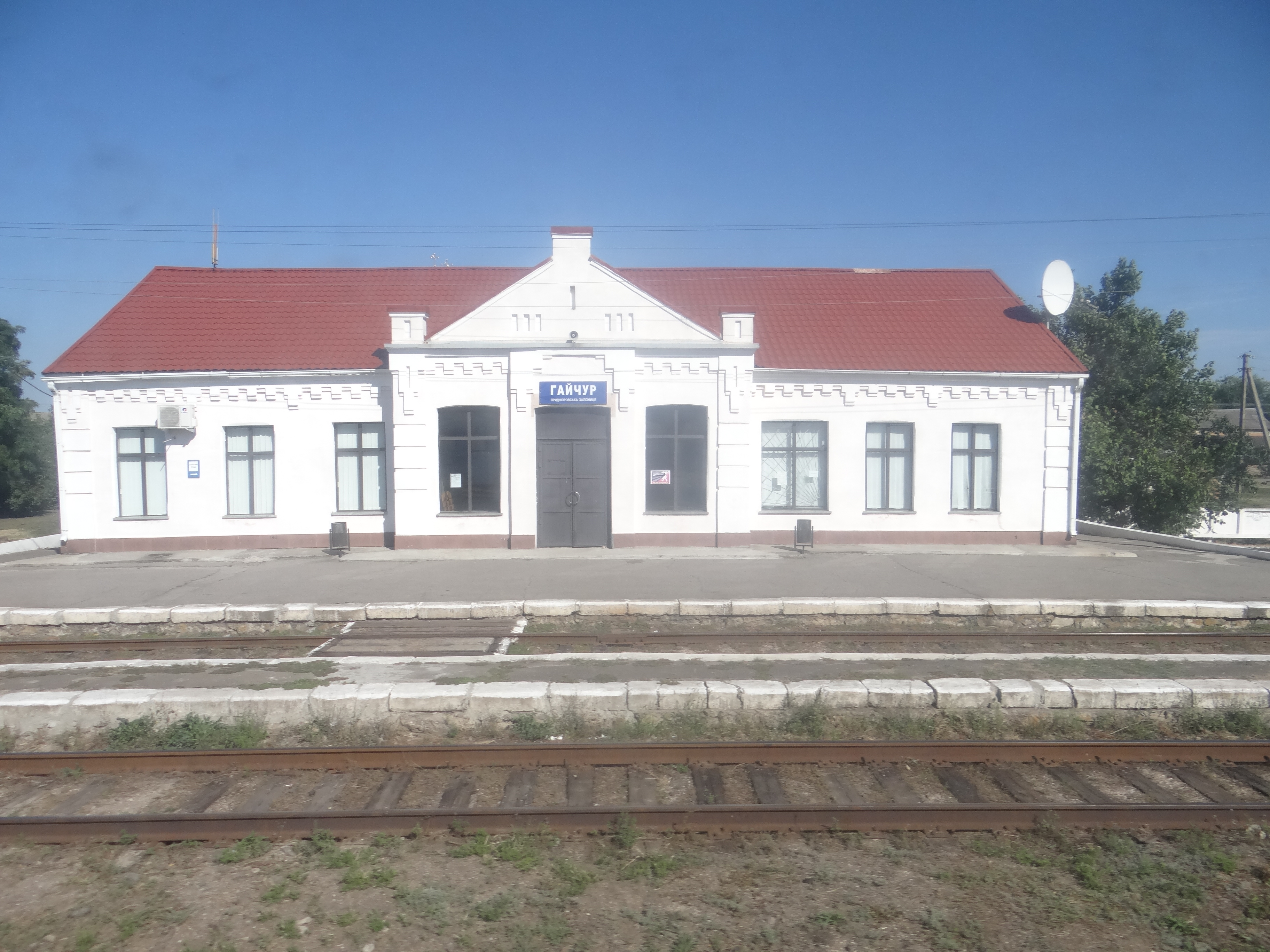 Гайчур